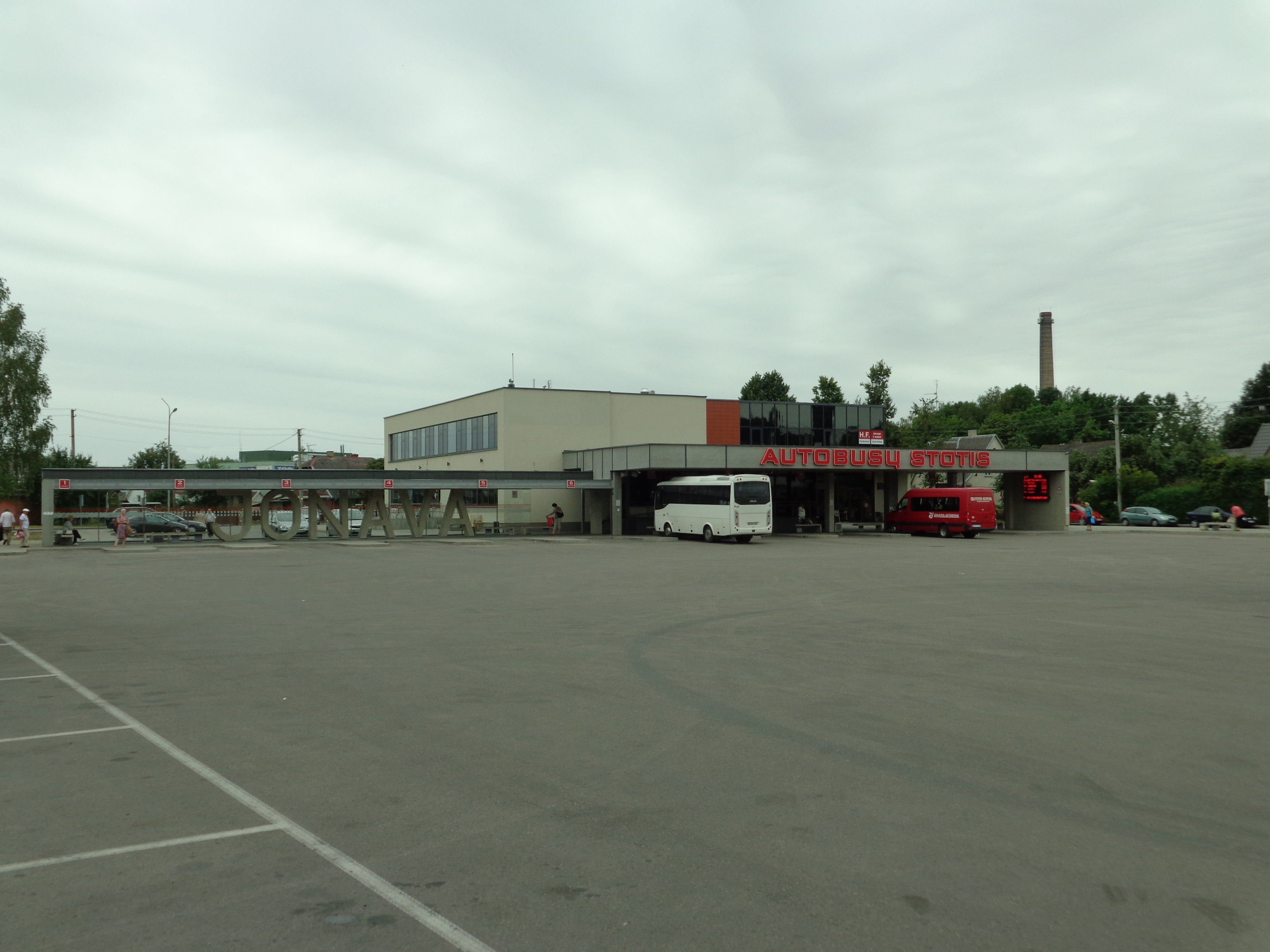 Jonavos Autobusų Stotis, 2014